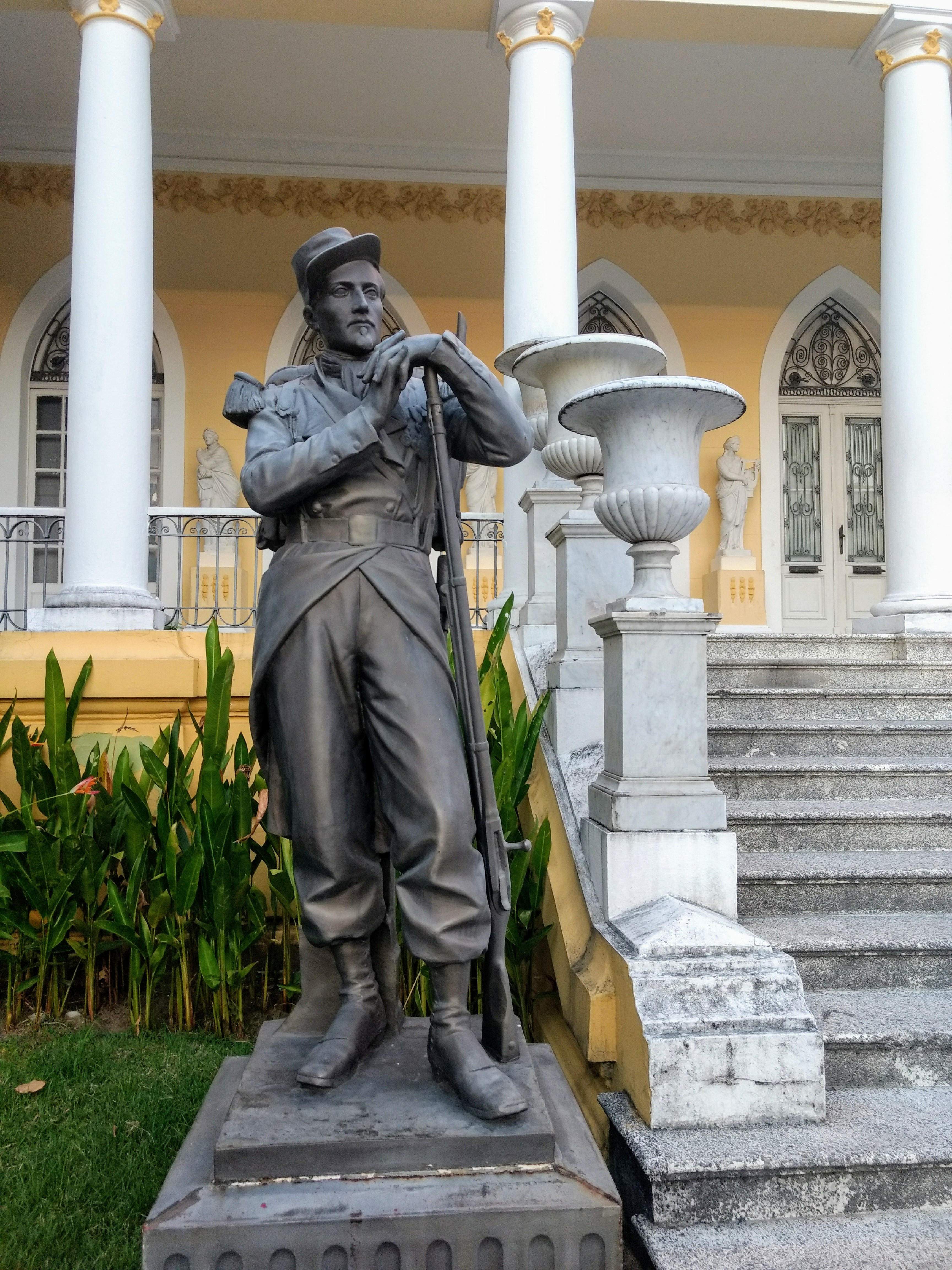 Escultura de um soldado ao lado da escadaria principal do Museu do Estado de Pernambuco, no Recife.